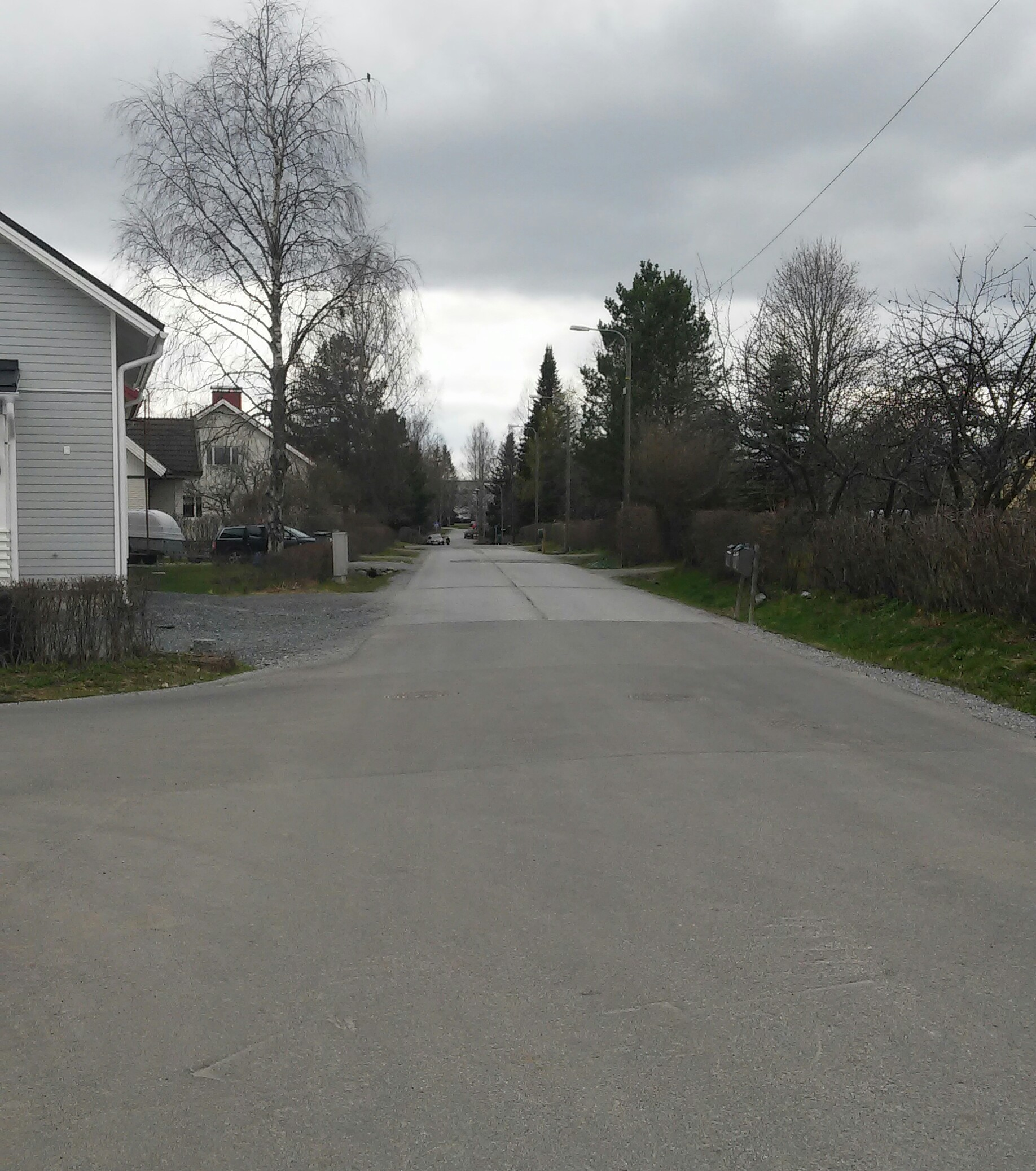 Nuijatie, Tampere, Finland